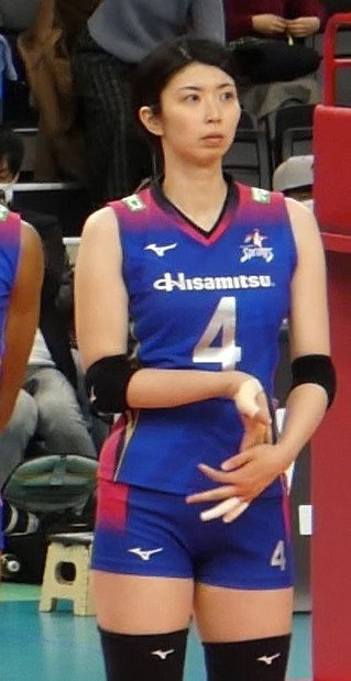 2019年